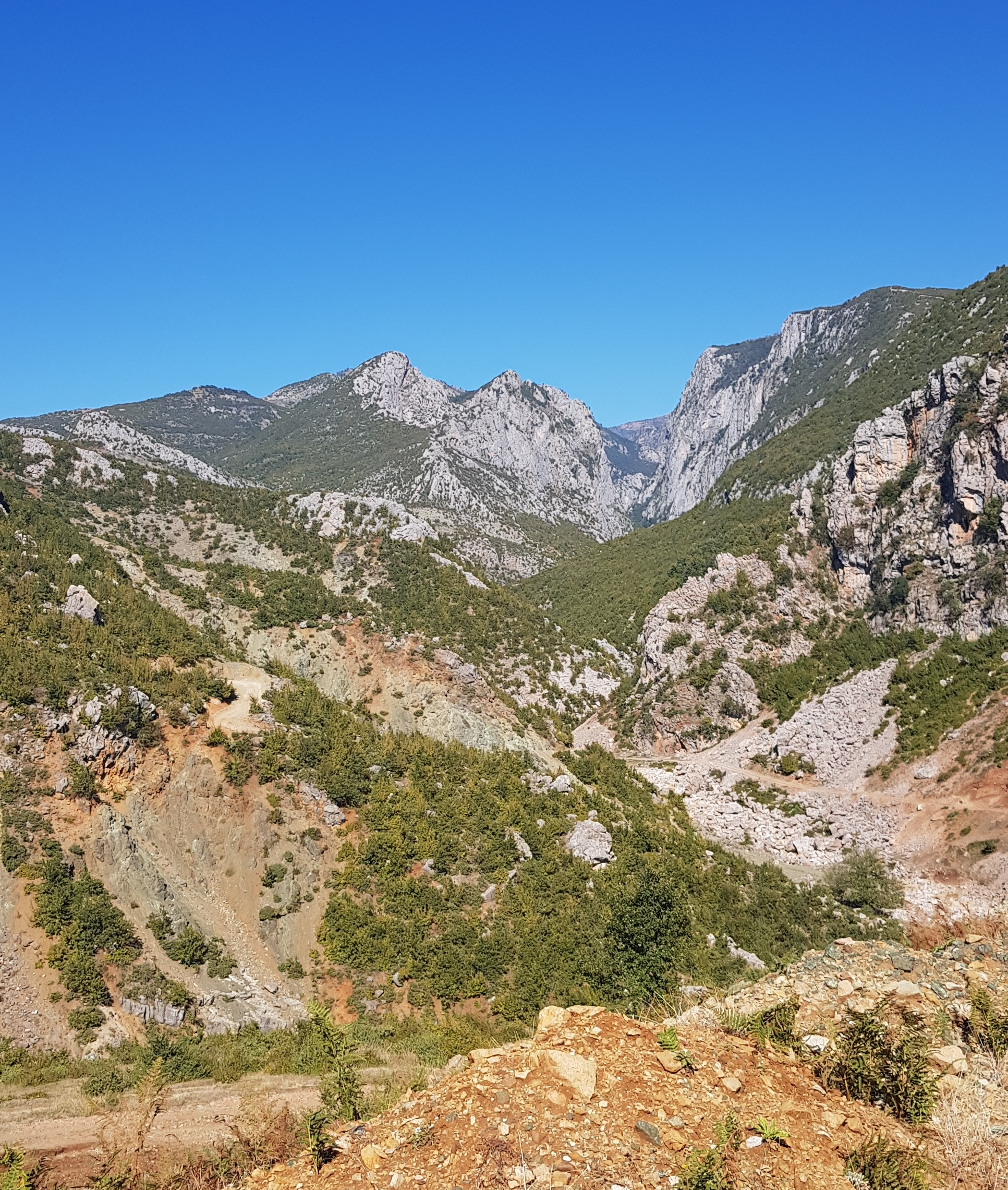 Zall Gjocaj, Mat. Një kënd nga ku shikohet zona e mbrojtur e Parkut Kombëtar në Zall-Gjoçaj.